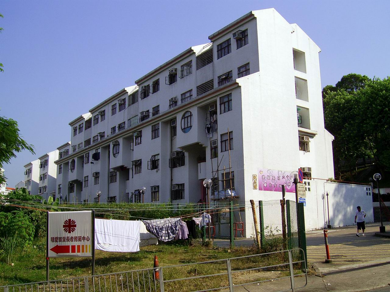 中文（香港）: 對面海邨海昌樓